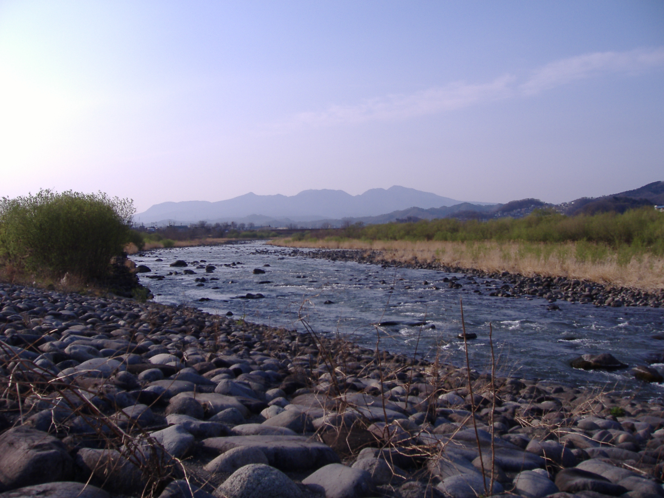 桐生の錦桜橋の近くで撮った渡良瀬川の写真です。